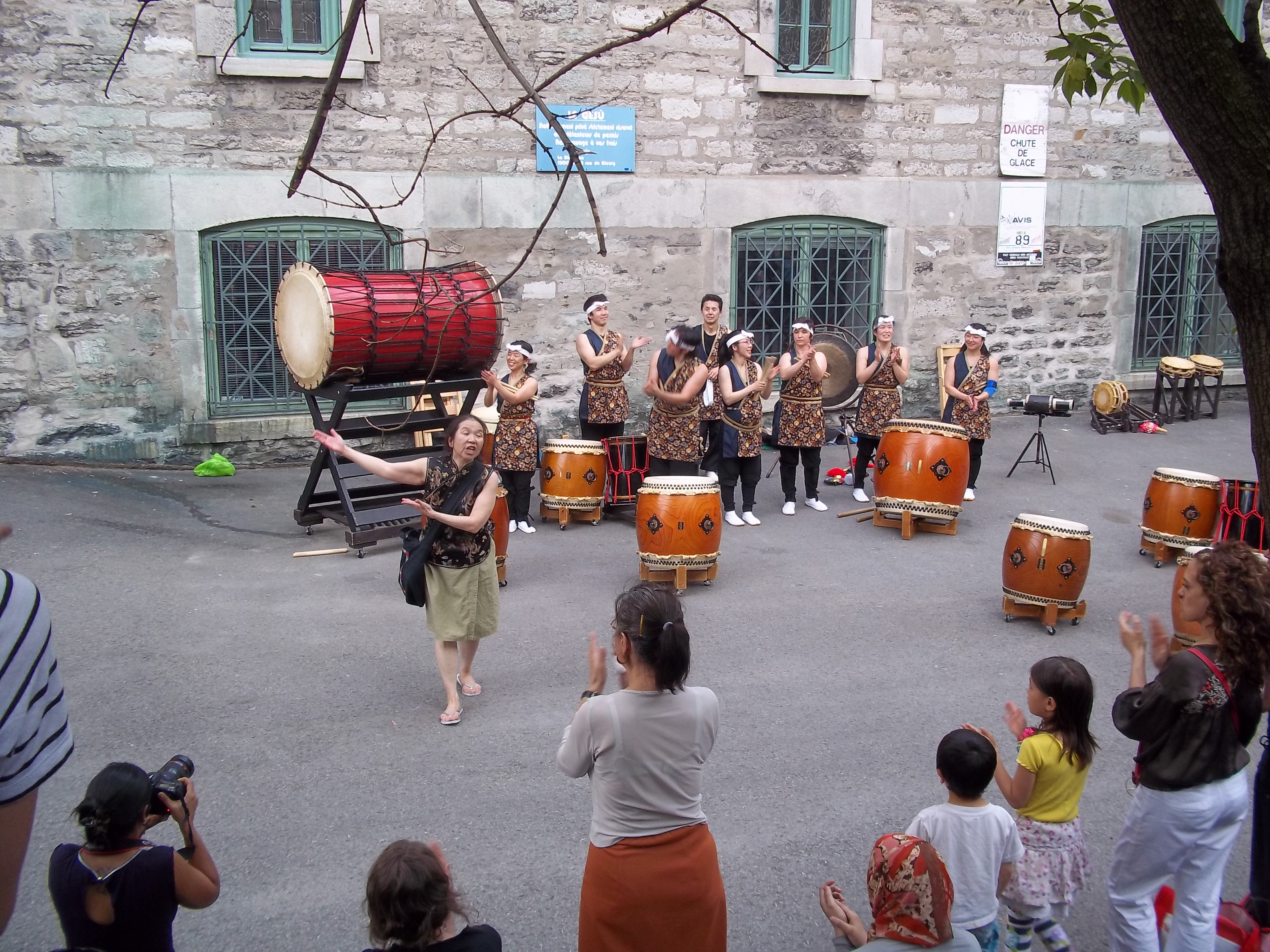 Tambours japonais près du Gesù, à Montréal, après une performance donnée par le groupe Arashi Daiko (les tambours de tempête) dans le cadre du Festival Accès Asie